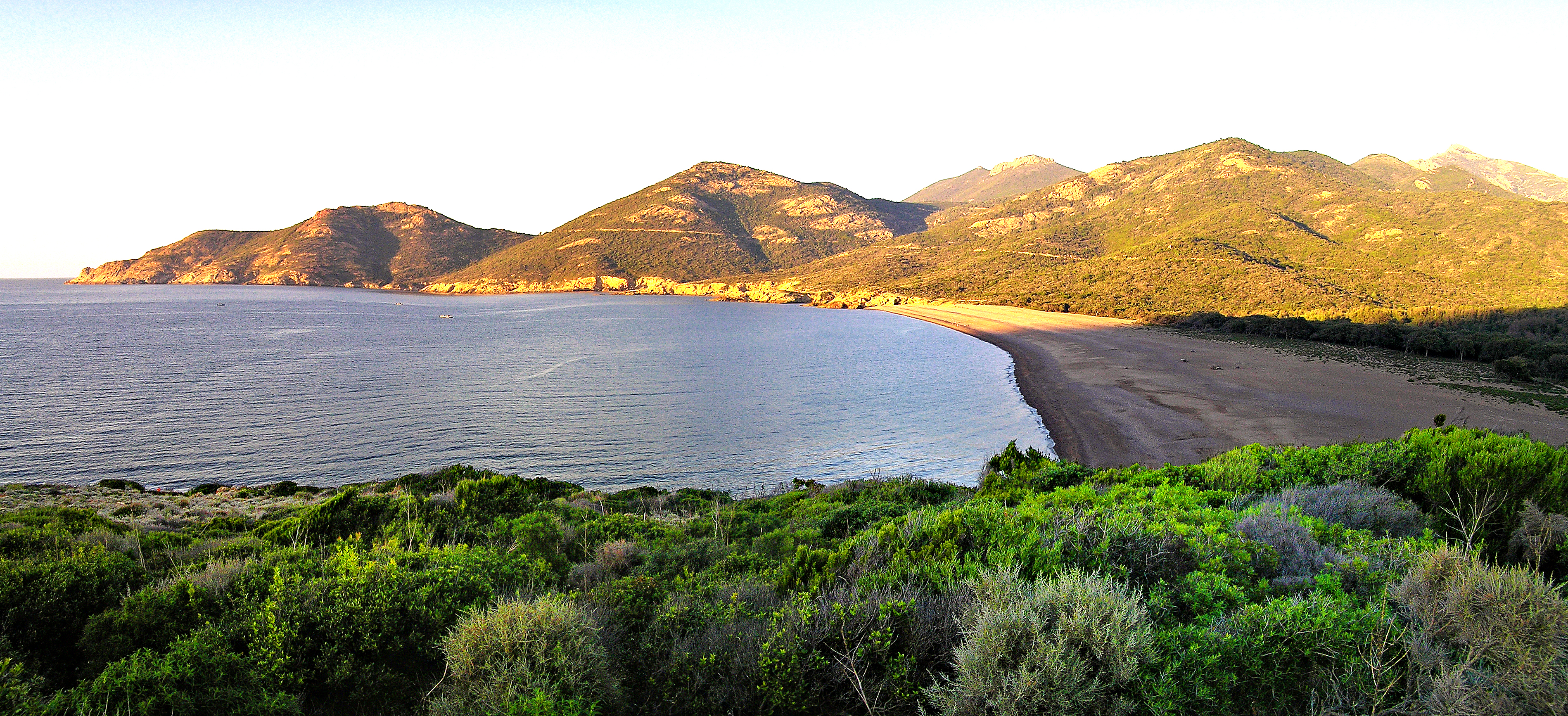 Galéria - Panorama sur le golfe